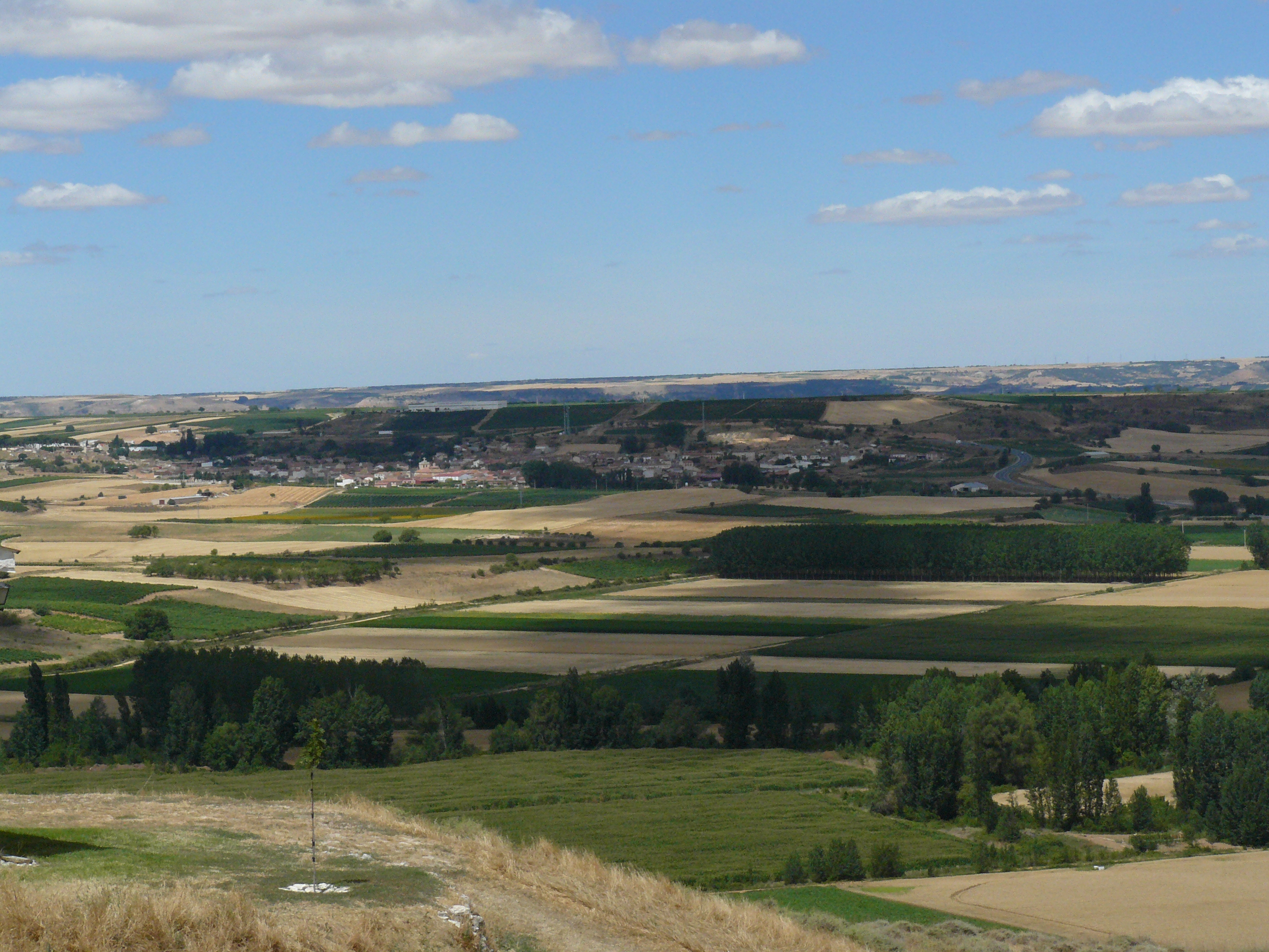 Fuentecén (Burgos).